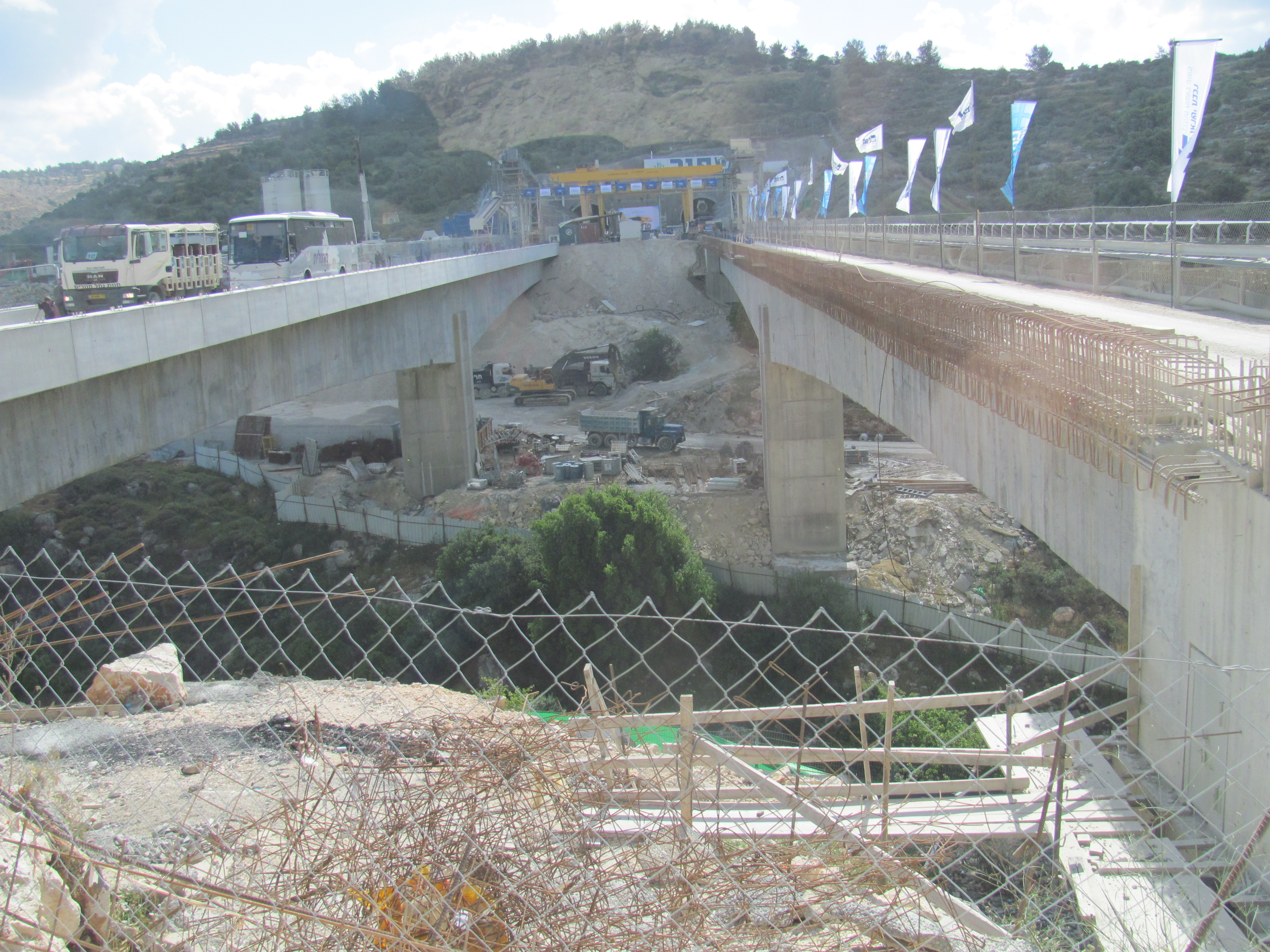 קו הרכבת המהיר לירושלים גשר 8 מעל נחל יתלה